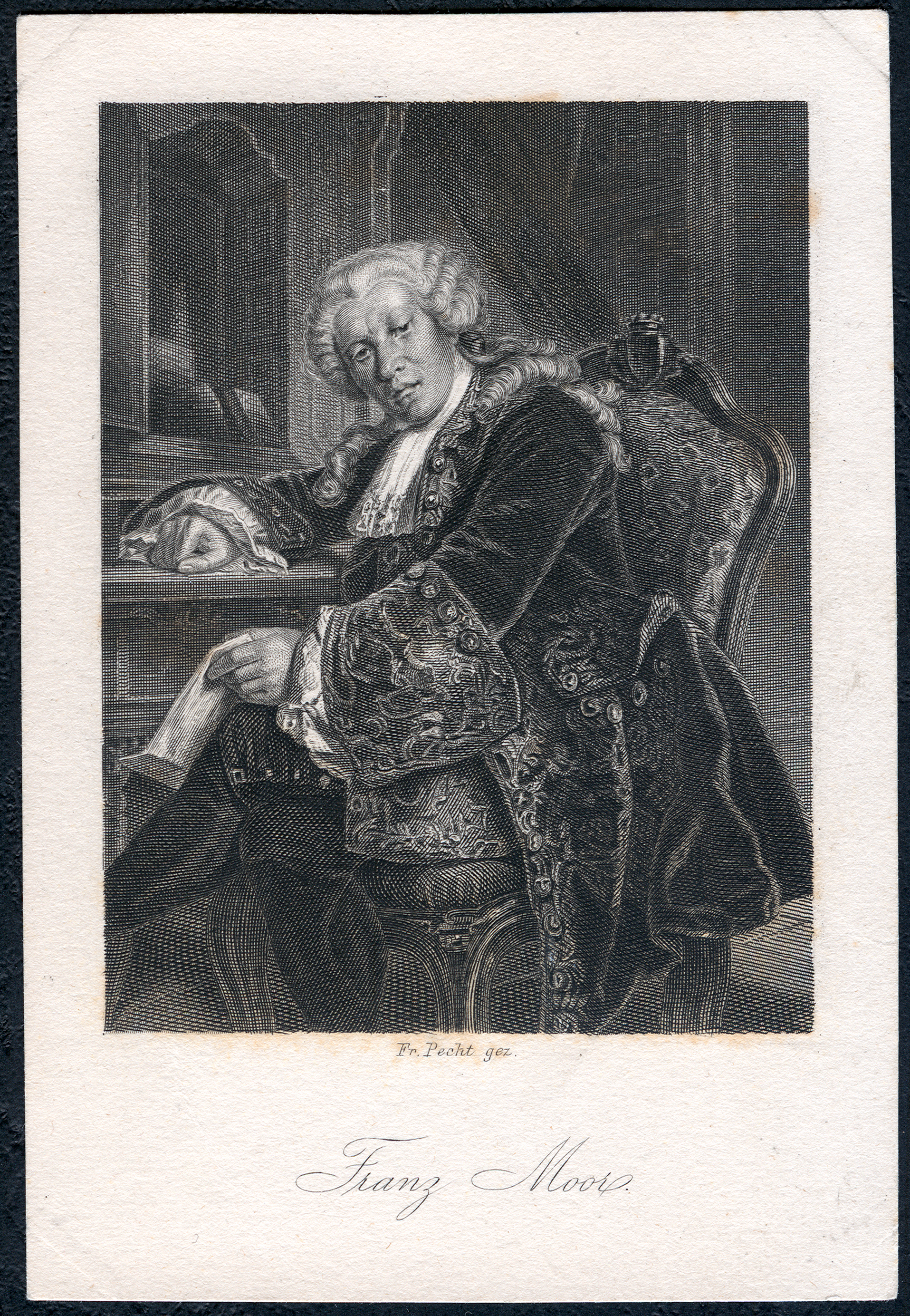 Franz Moor aus Friedrich Schillers Die Räuber, als Stahlstich gestochen von Johann Leonhard Raab um 1859 nach einer Zeichnung von Friedrich Pecht; das untertitelte Blatt hat die Maße circa 8 cm x 11,6 cm und auf der Rückseite keine weiteren Angaben. Es gehört zu einer Serie, möglicherweise als frühes Sammelbild, die als Schiller-Galerie von Friedrich Pecht und von Arthur von Ramberg bekannt geworden ist.